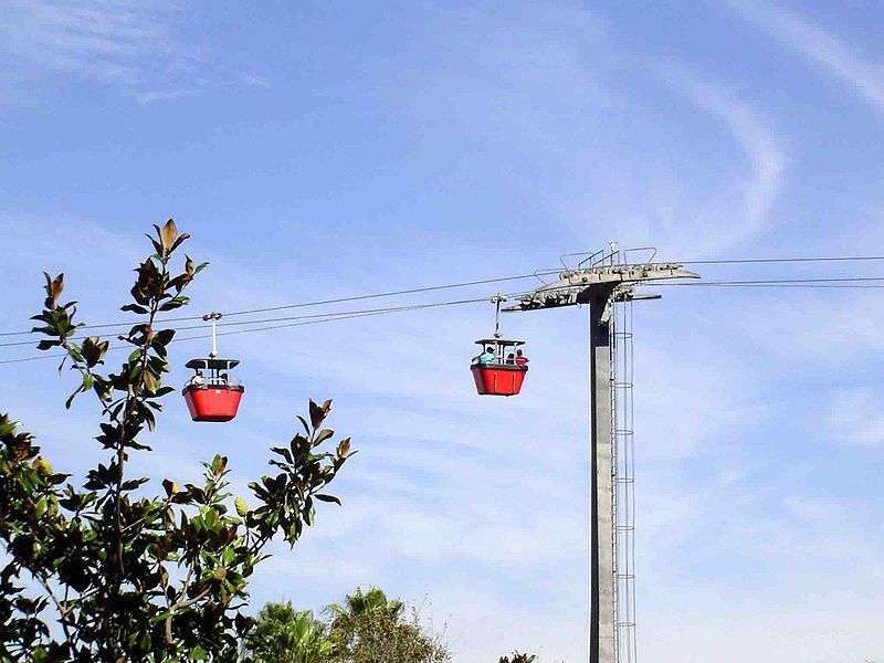 Ancien téléphérique de 1970. On remarque l’absence de vitres sur les cabines.